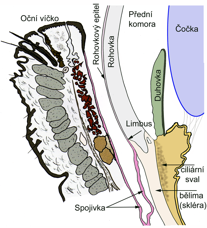 Oko v řezu